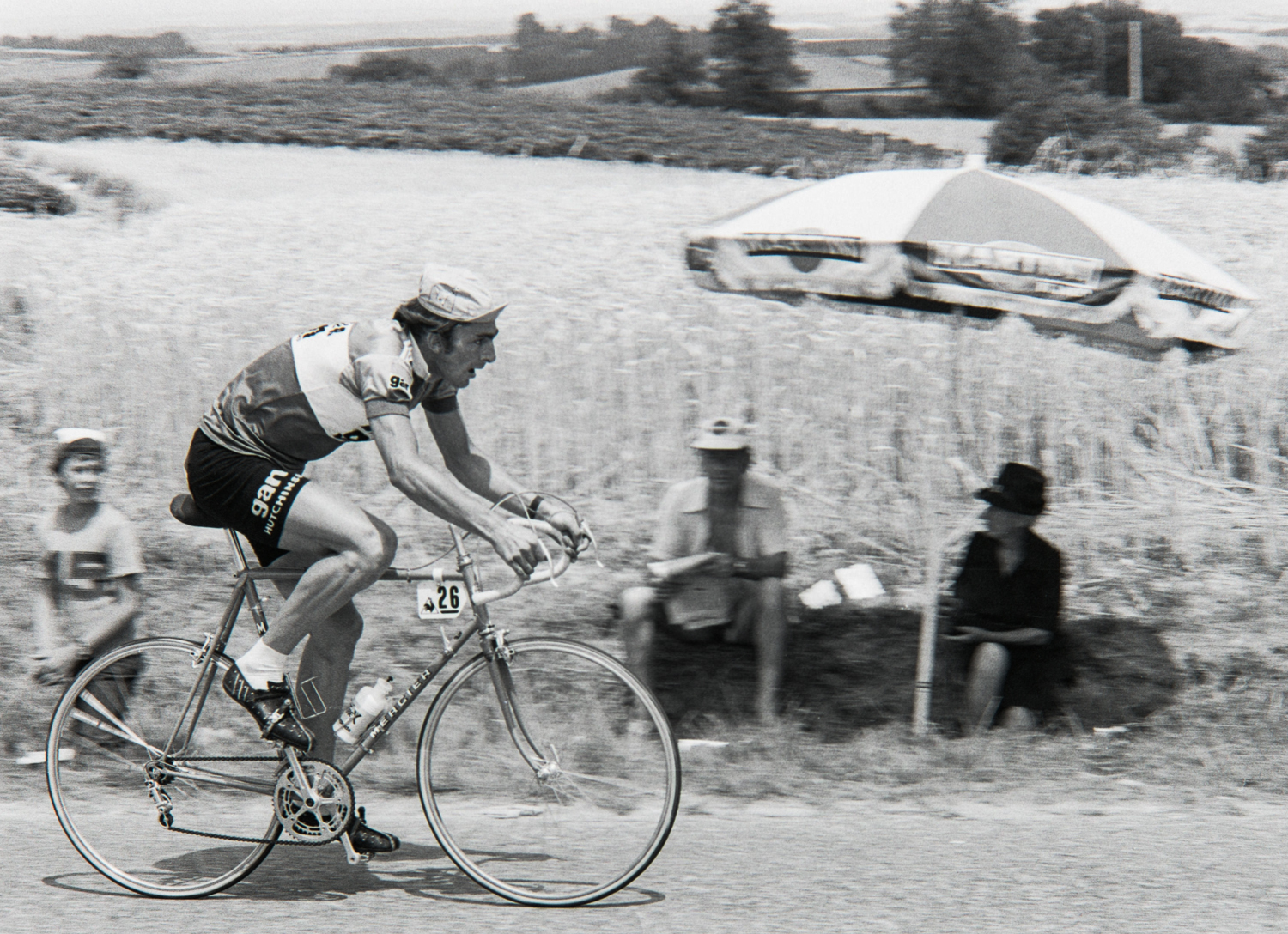 Michel Périn durant le Tour de France 1976. Photographie : René Milanese